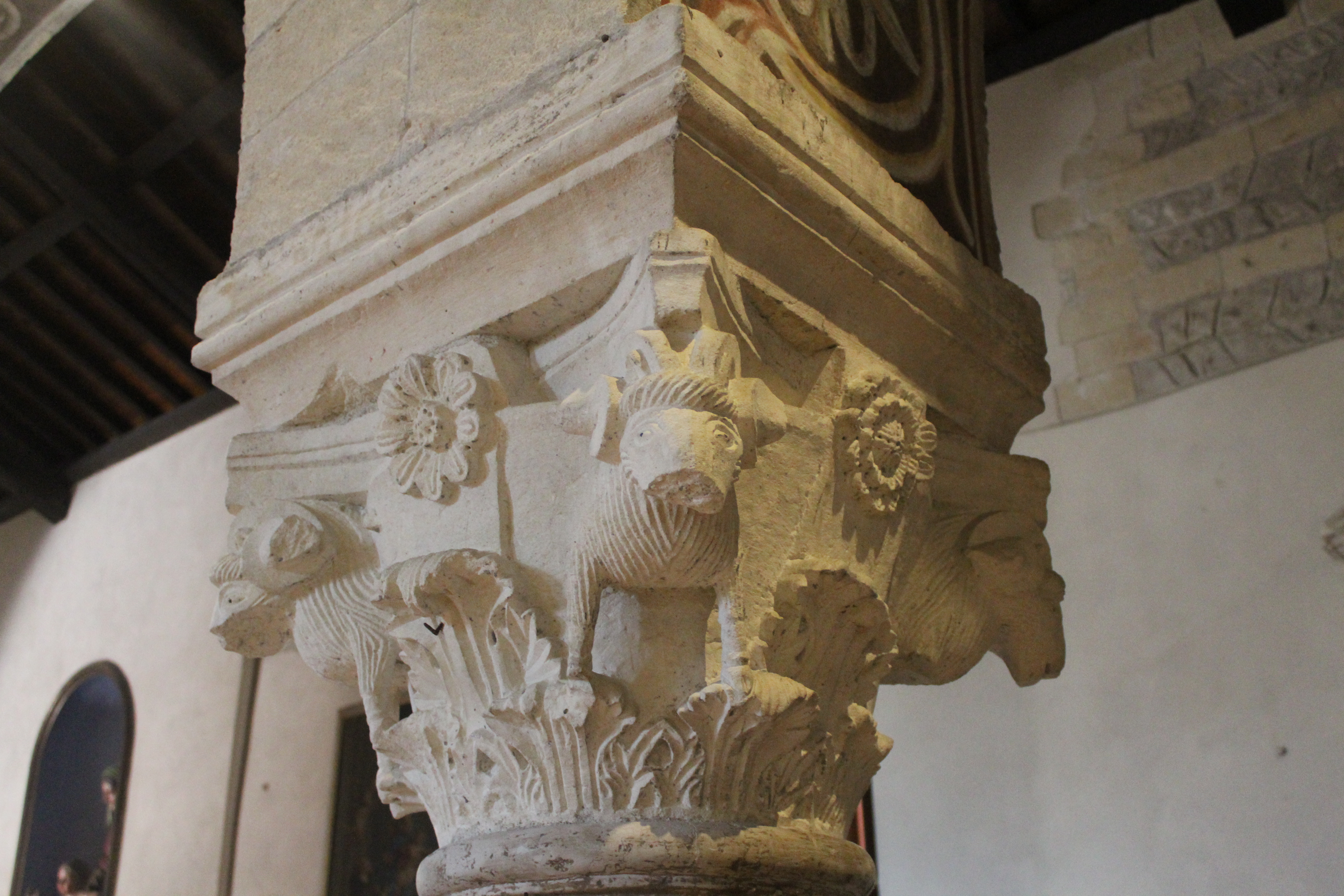 Chiesa di San Giovanni in Valle a Verona. Interno.